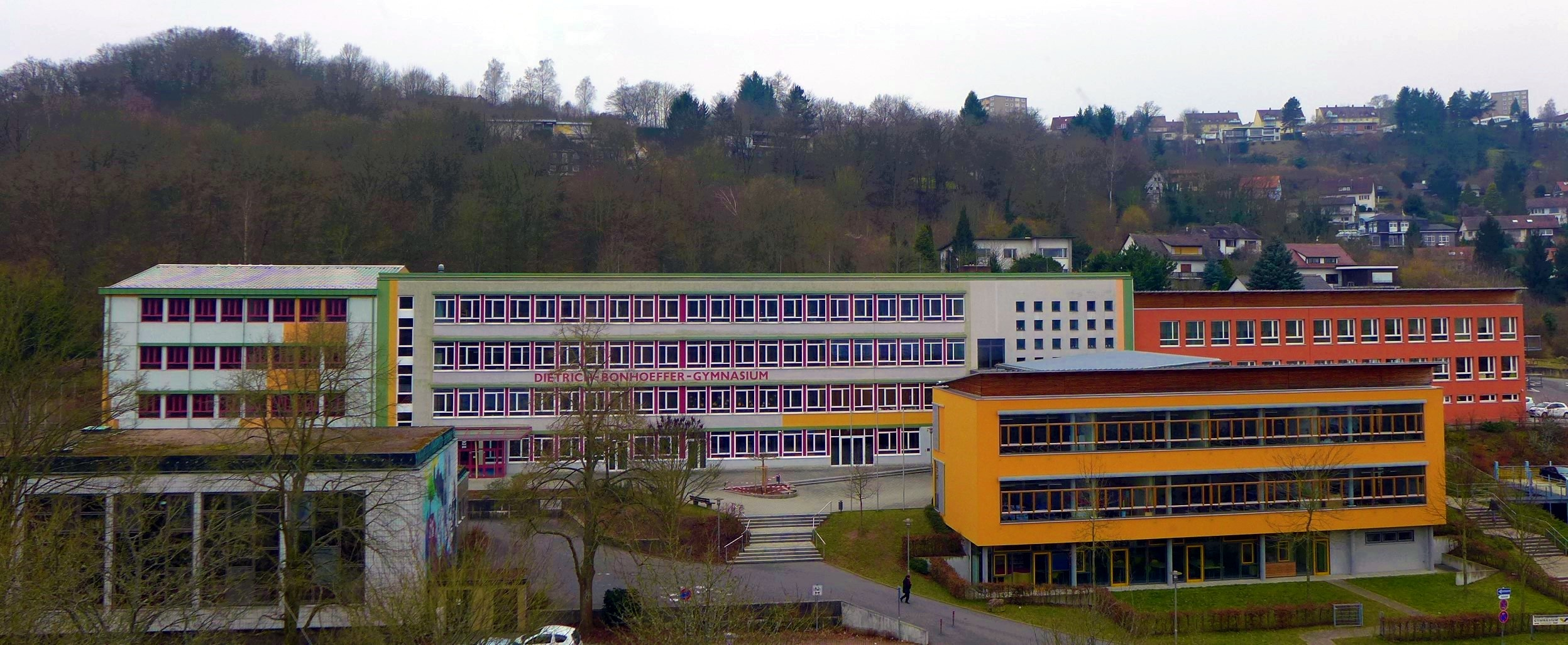 Gesamtansicht des Dietrich-Bonhoeffer-Gymnasiums